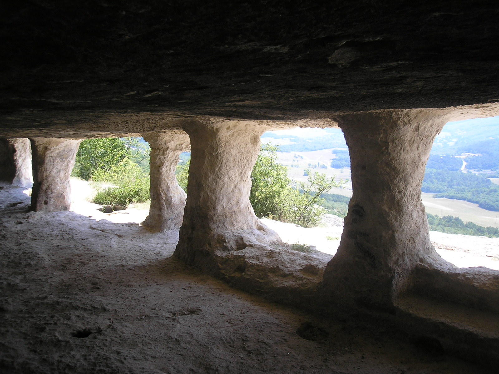 Печерний монастир "Чельтер-Мармара"